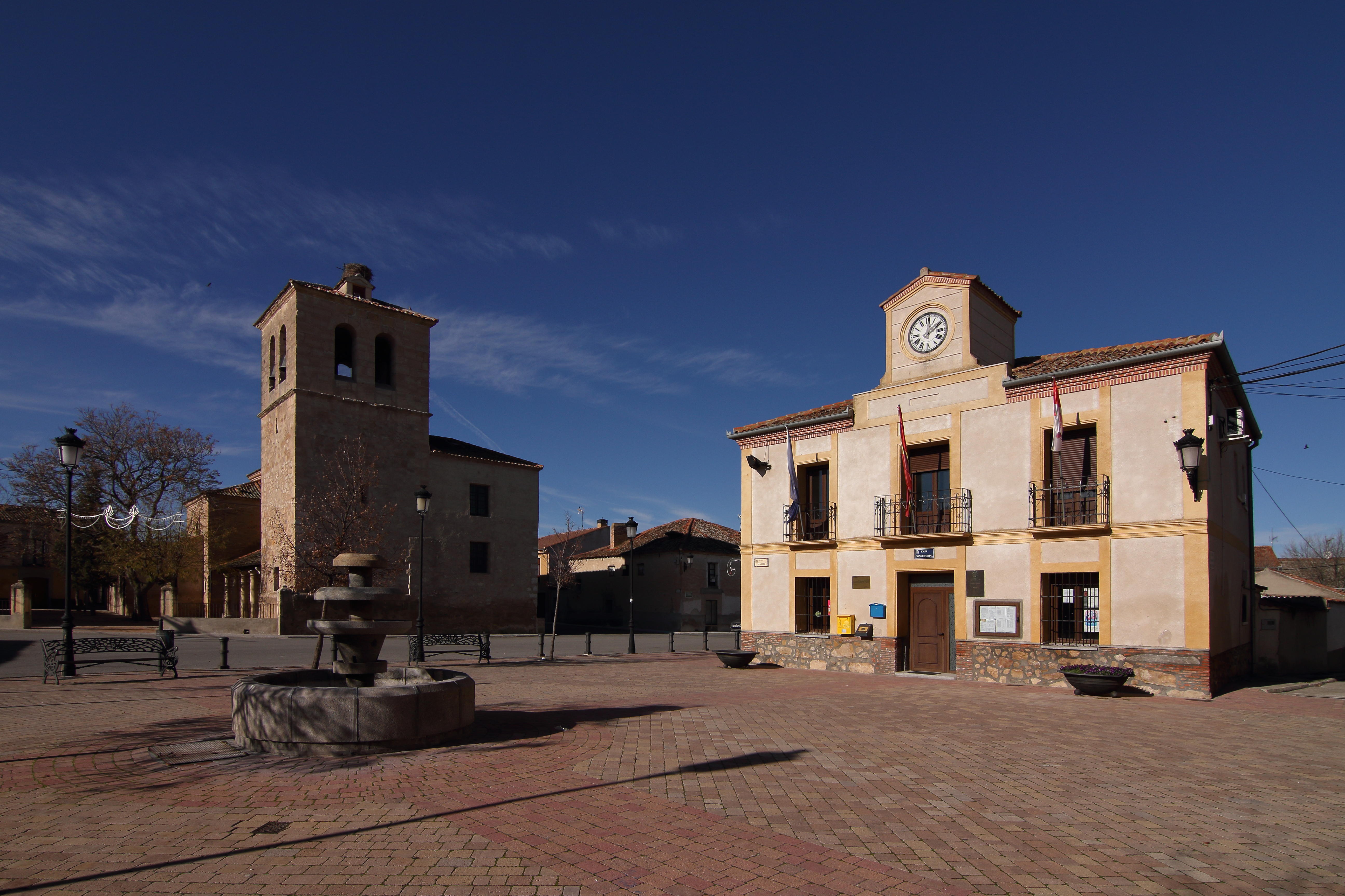 Escarabajosa de cabezas, Casa Consistorial e Iglesia